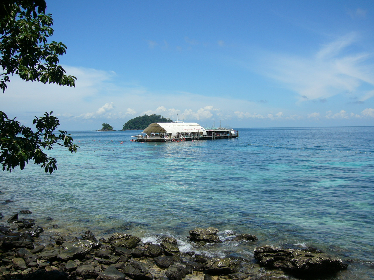 Langkawi Malaysia